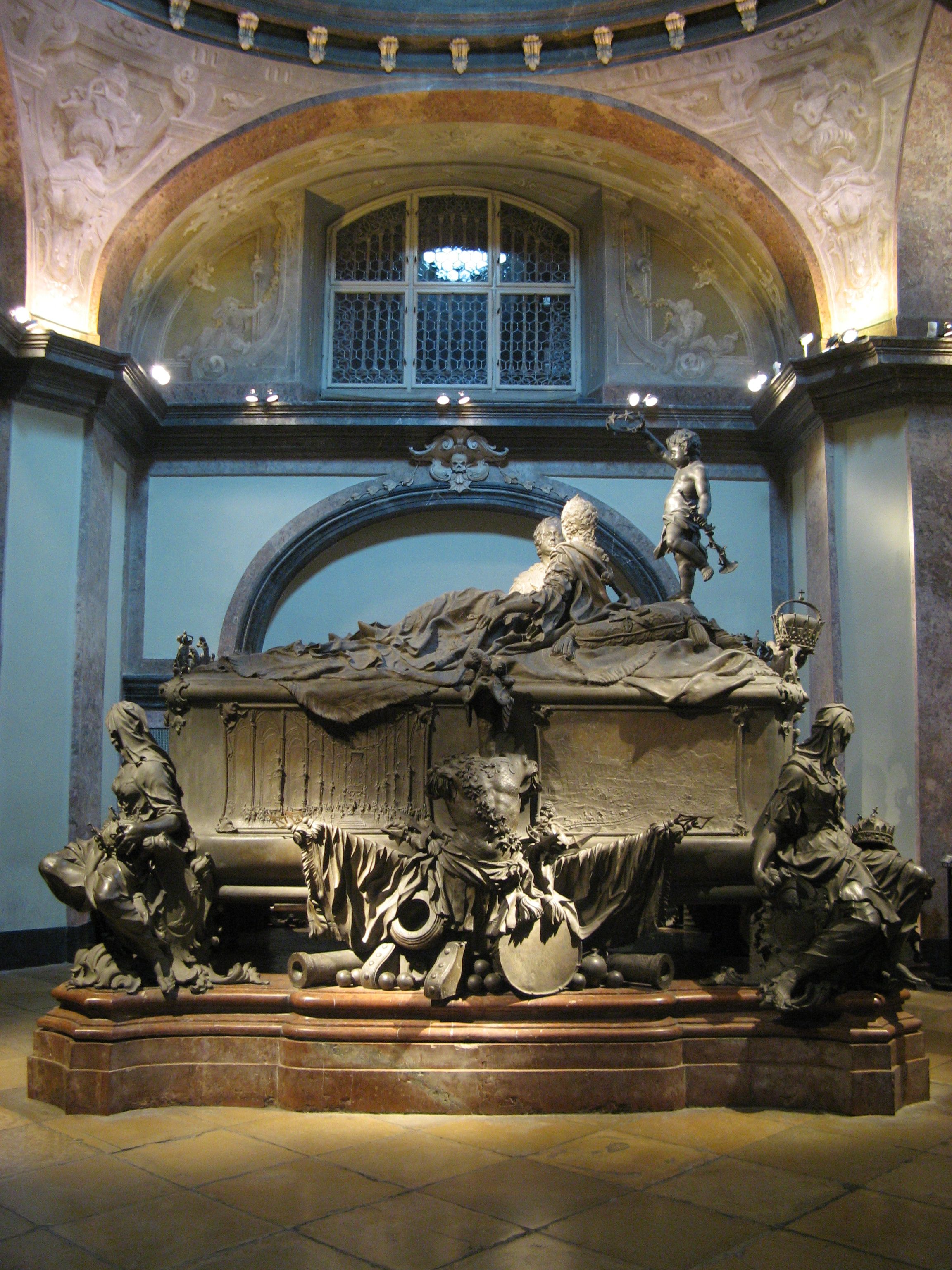 Kaisergruft